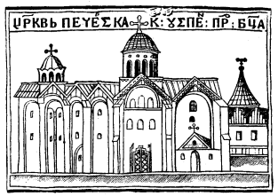 Ілюстрація з книги "Бесіди Святого Івана Златоуста на 14 послань Апостола Павла", Київ 1623.